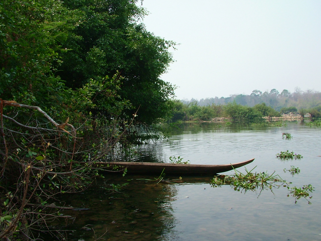 Thuyền độc mộc trên sông Serepôk đoạn qua Bản Đôn Việt Nam